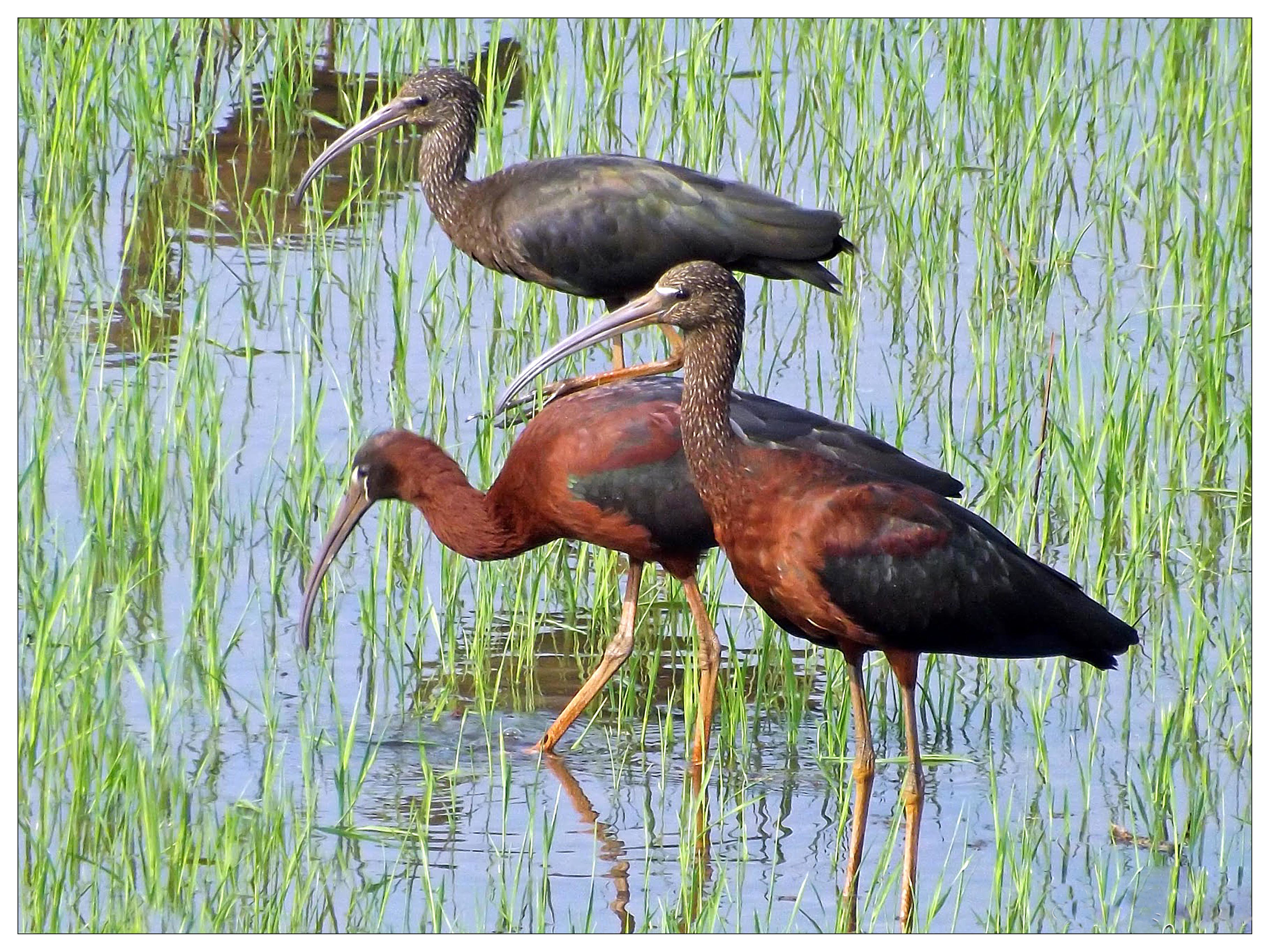 ചെമ്പൻ ഐബിസ്